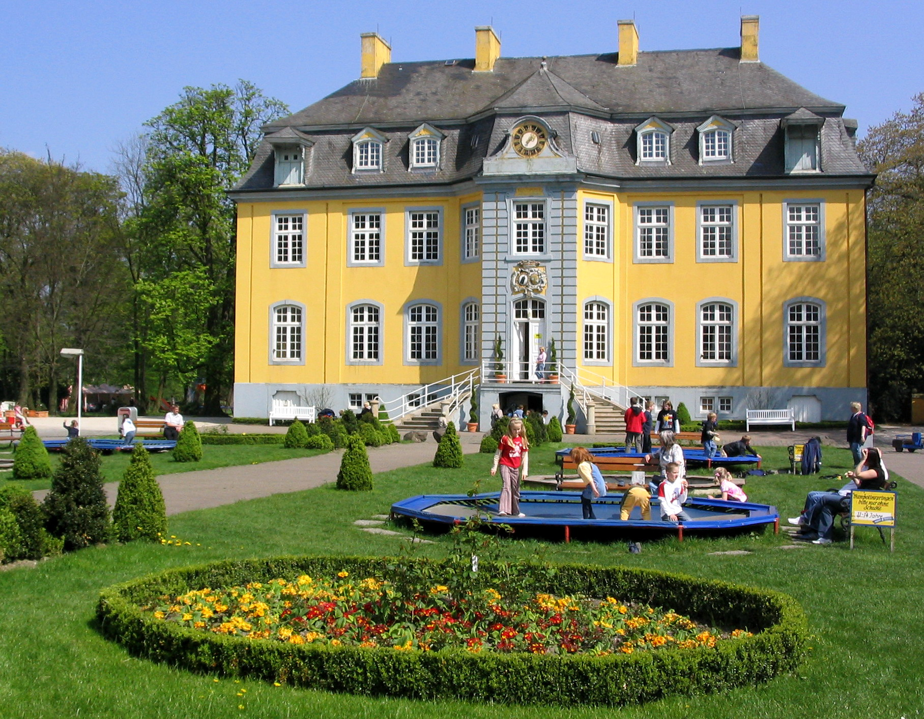 Schloss Beck bei Bottrop Kirchhellen